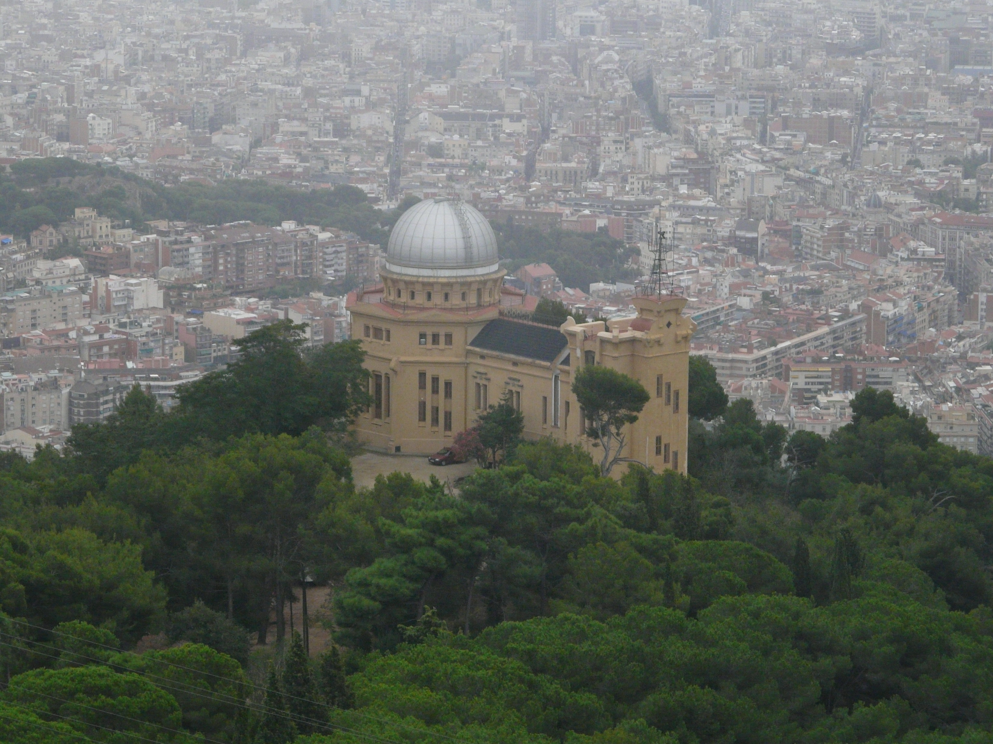 Observatori Fabra (Barcelona)